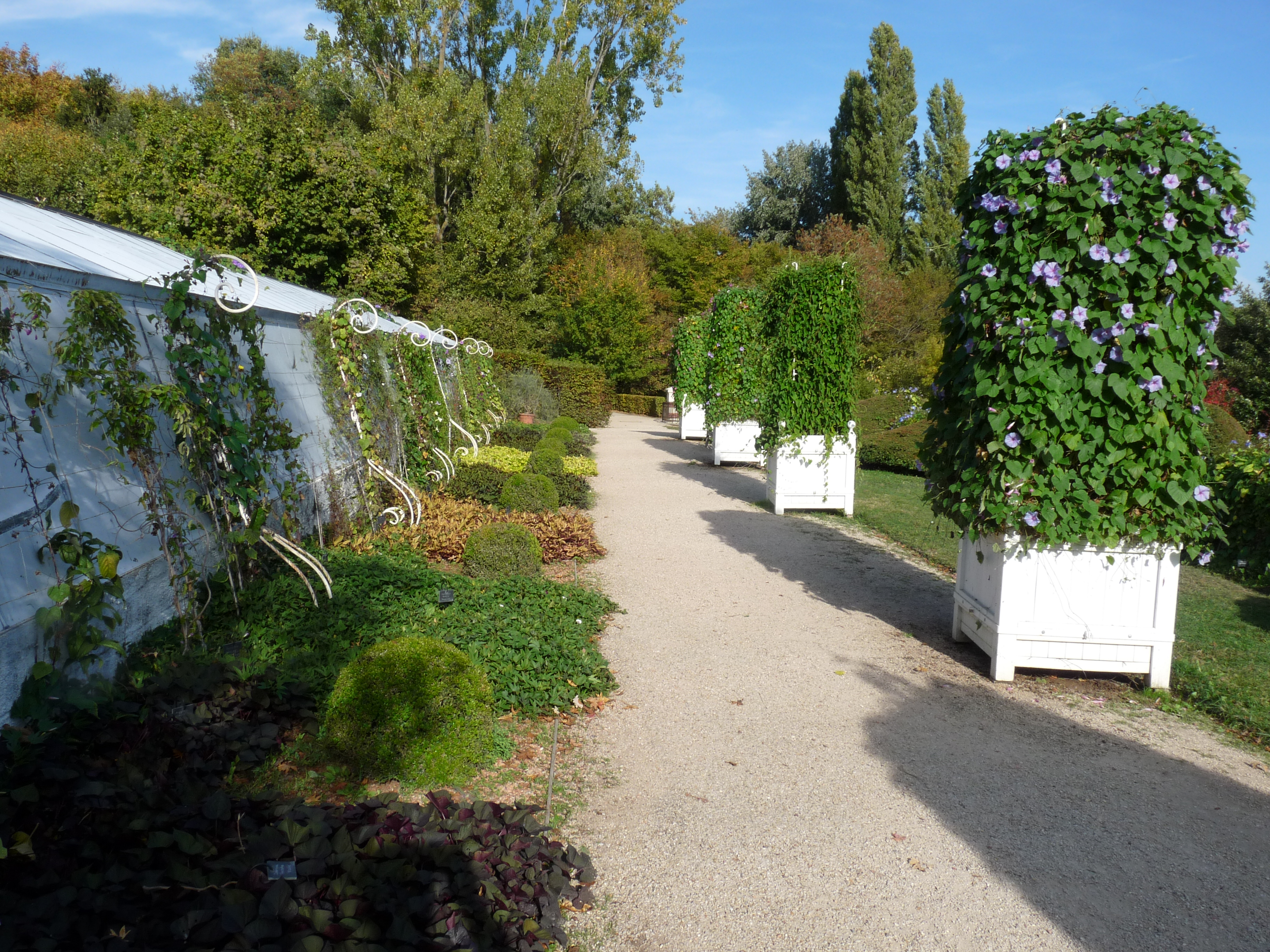 Collection nationale de Convolvulacées à Châtenay-Malabry, vue des plantes à l’extérieur des serres de l’arboretum de la Vallée-aux-Loups.